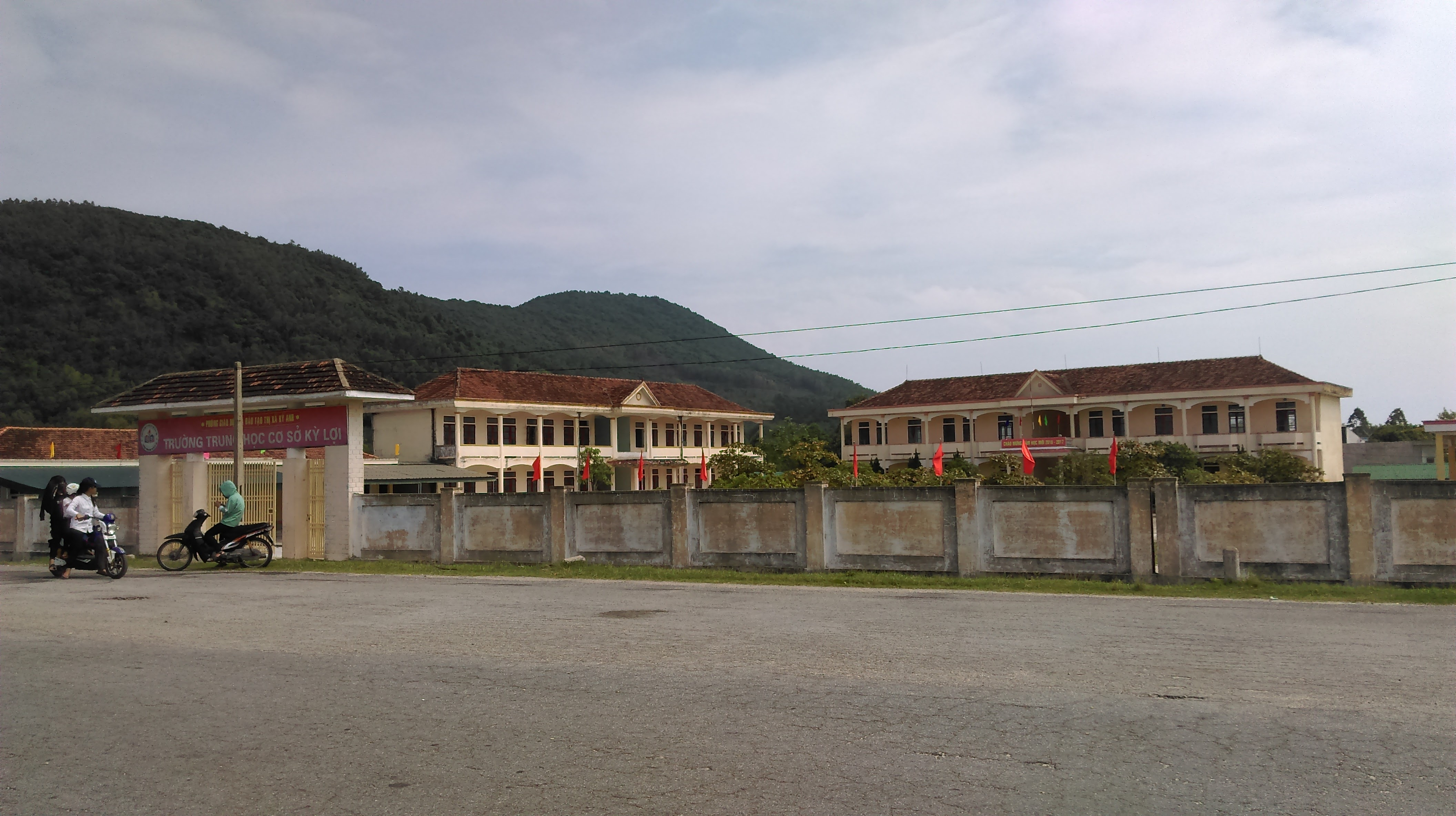 Trường THCS Kỳ Lợi, Kỳ Anh, Hà Tĩnh